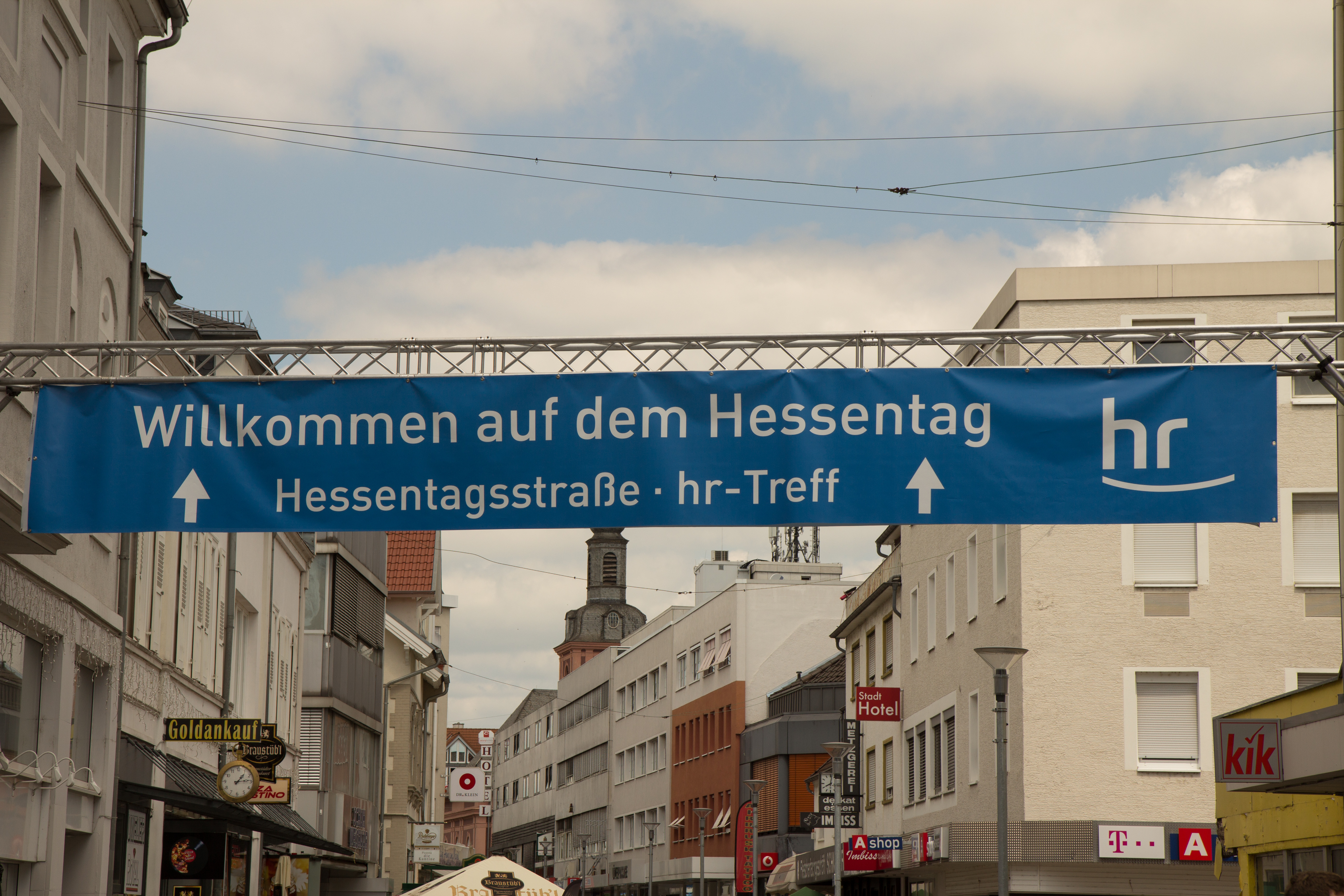 Umzug zum Hessentag in Rüsselsheim am 18. Juni 2017